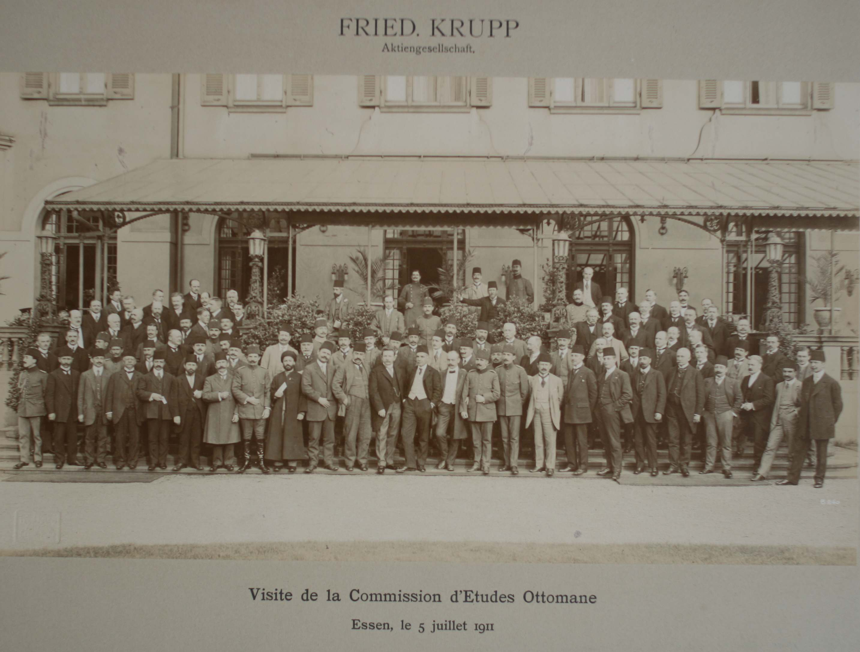 Delegazione turca alla fabbrica tedesca Krupp